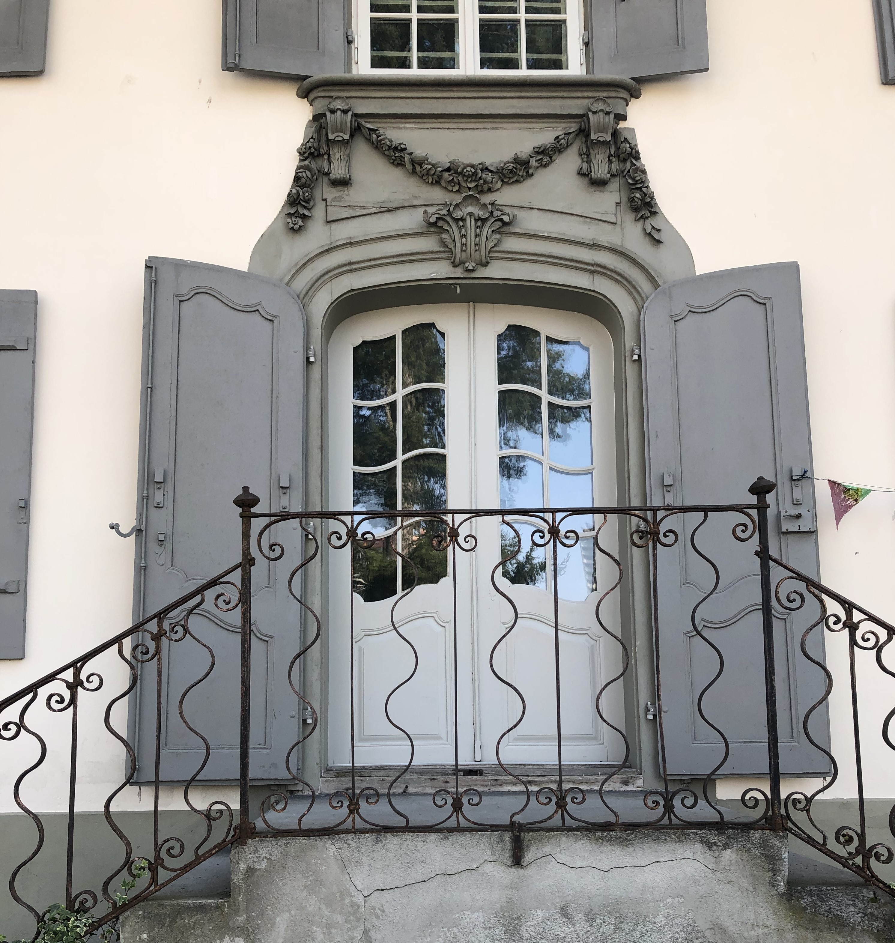 Brünnen: Portal Brünnenschlössli